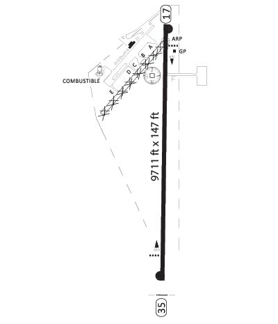 Plano SLW